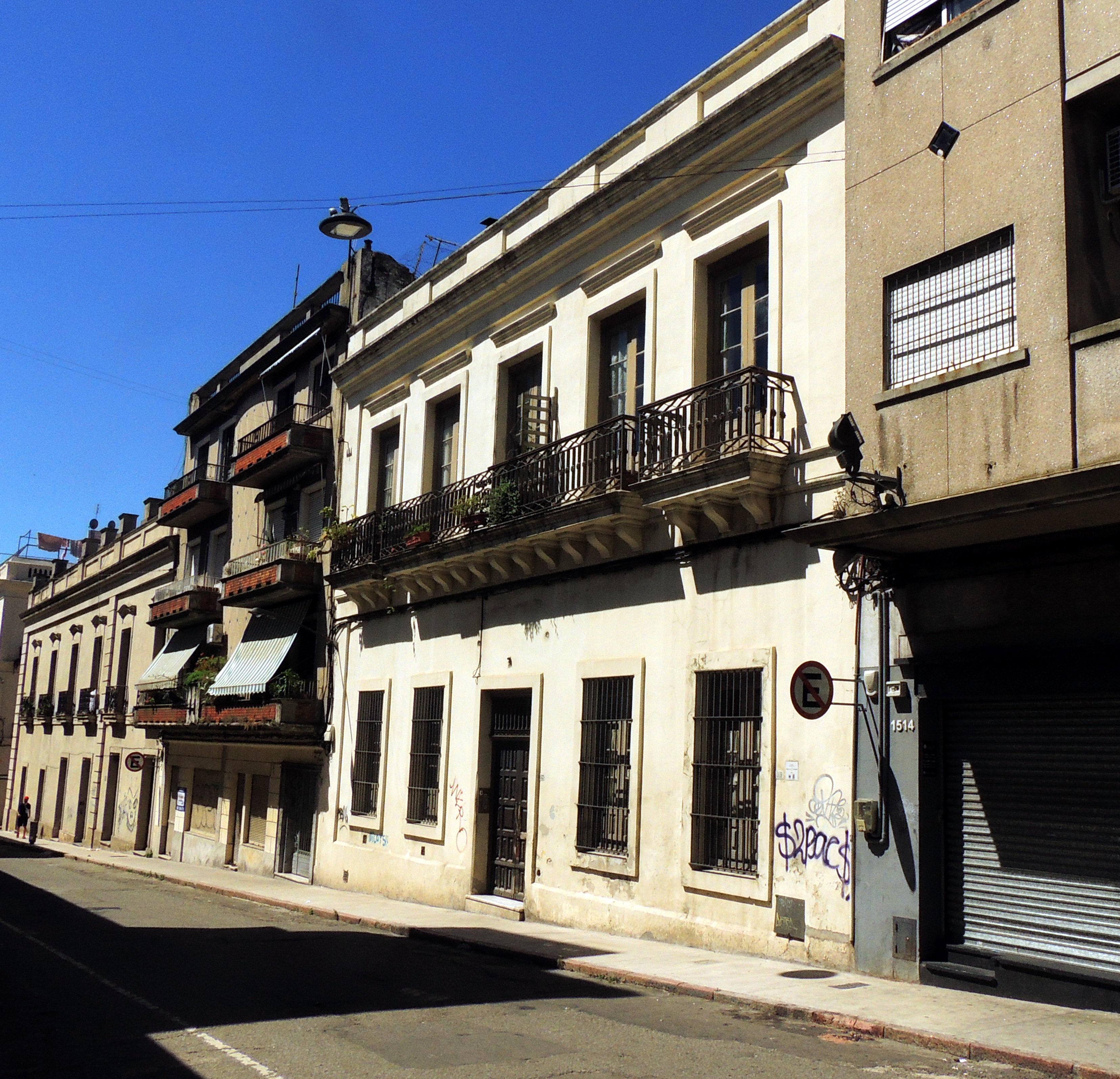 Wohngebäude in der Calle Ituzaingó, Montevideo.